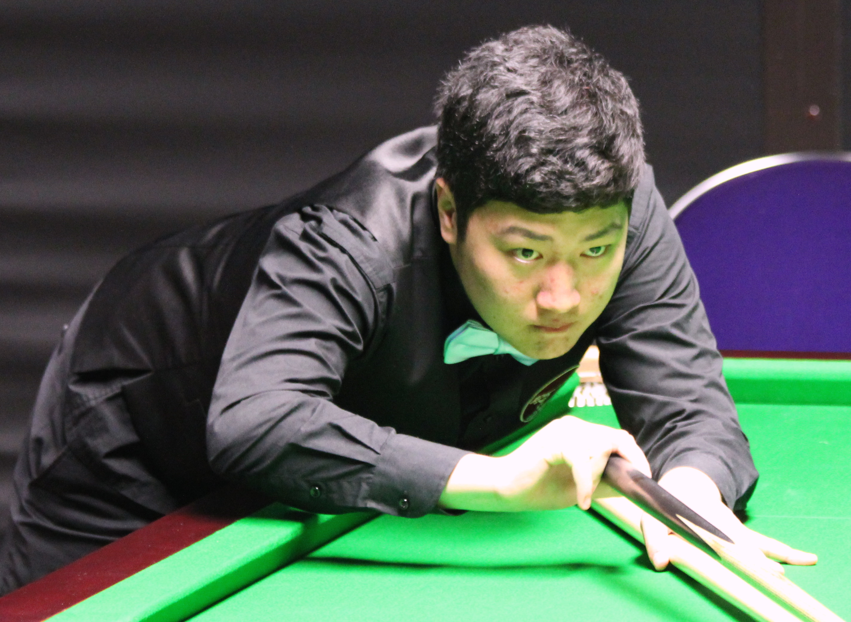 Yan Bingtao beim Paul Hunter Classic 2016